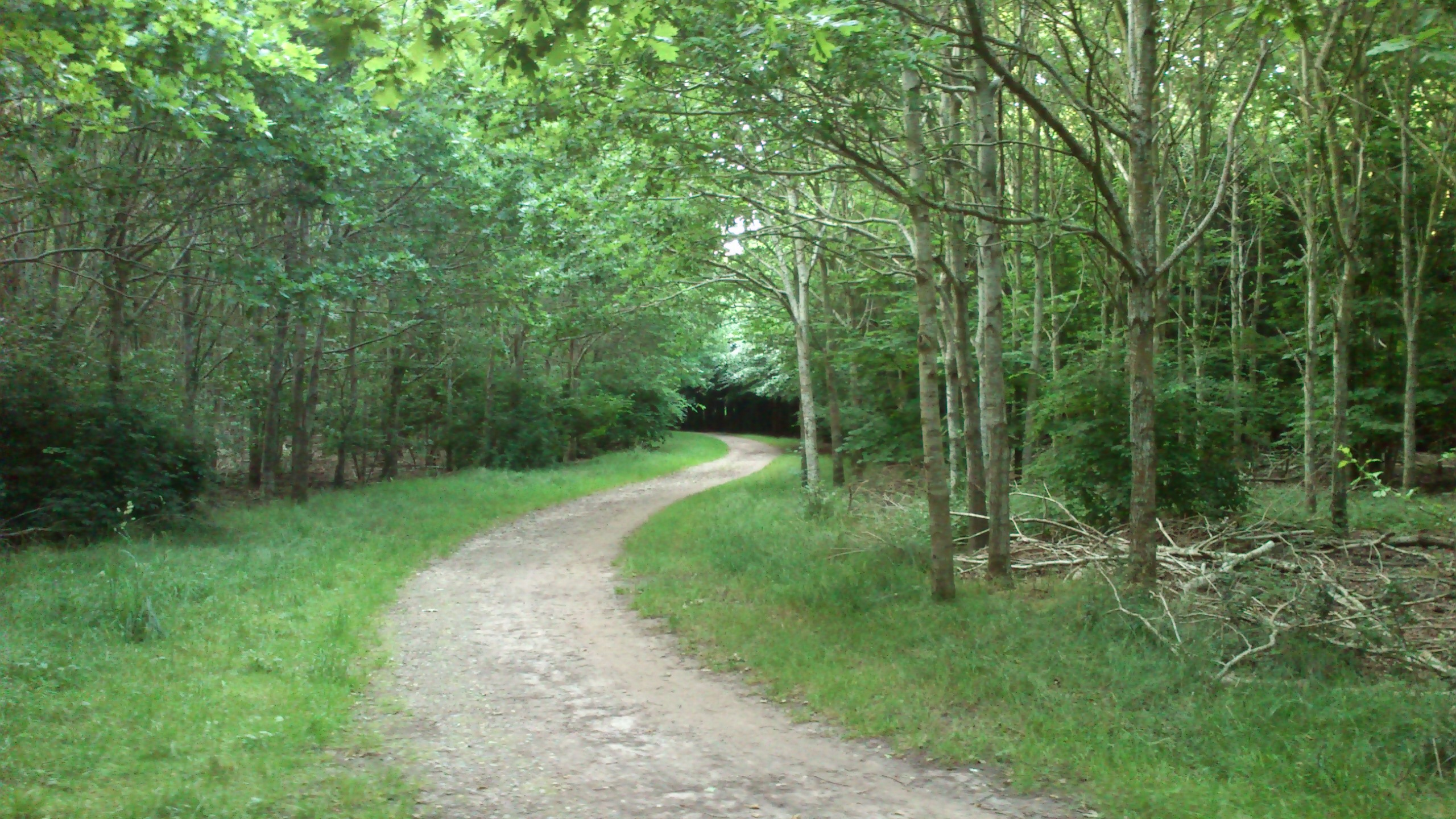 Mollerup Skov i juli.